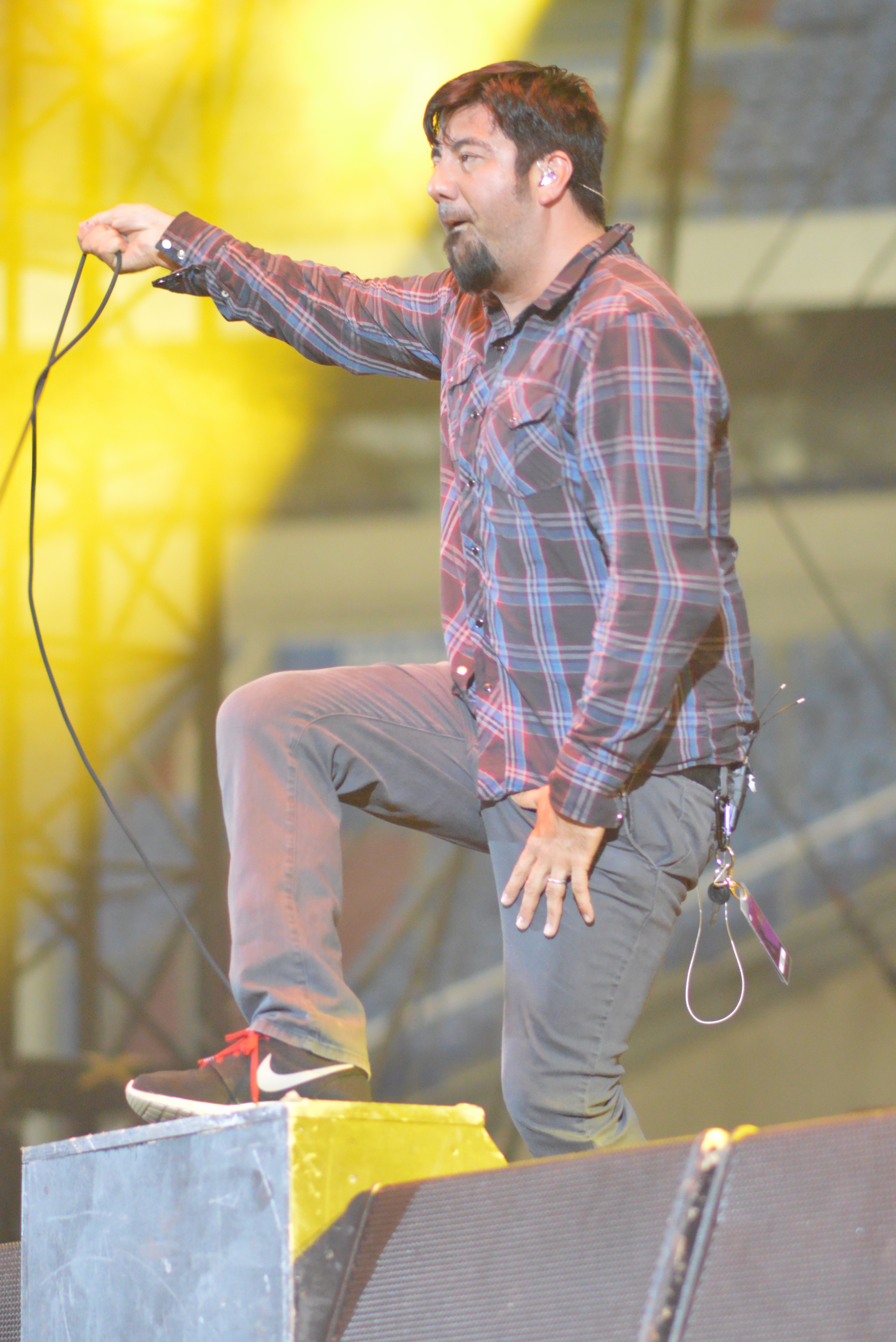 Deftones bei Rock im Pott 2013